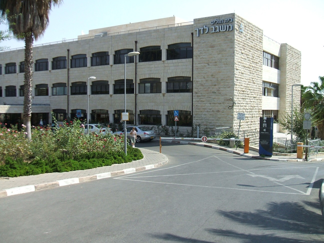 Misgav Ladakh hospital, Jerusalem